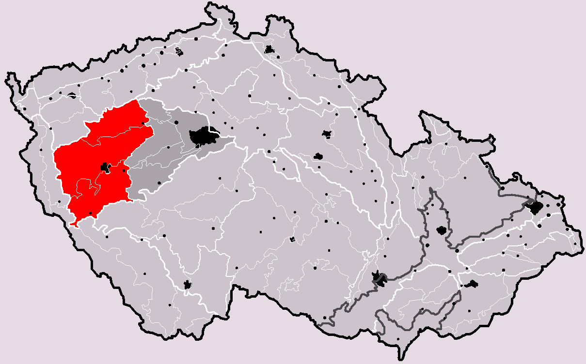 Poloha geomorfologické oblasti (podsoustavy) Plzeňská pahorkatina v rámci České republiky. Hercynský systém Hercynská pohoří I Česká vysočina I5 (V) Poberounská subprovincie I5B (VB) Plzeňská pahorkatina